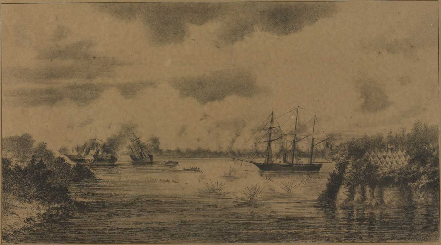 Scena do Combate Naval de Riachuelo no dia 14 de junho de 1865. A canhoneira — Araguay — (comandante Hoonholtz) incendiando o vapor inimigo — Paraguay — debaixo do fogo das baterias paraguayas do Riachuelo. O fundo do quadro é a bateria do Riachuelo fazendo fogo contra nós.